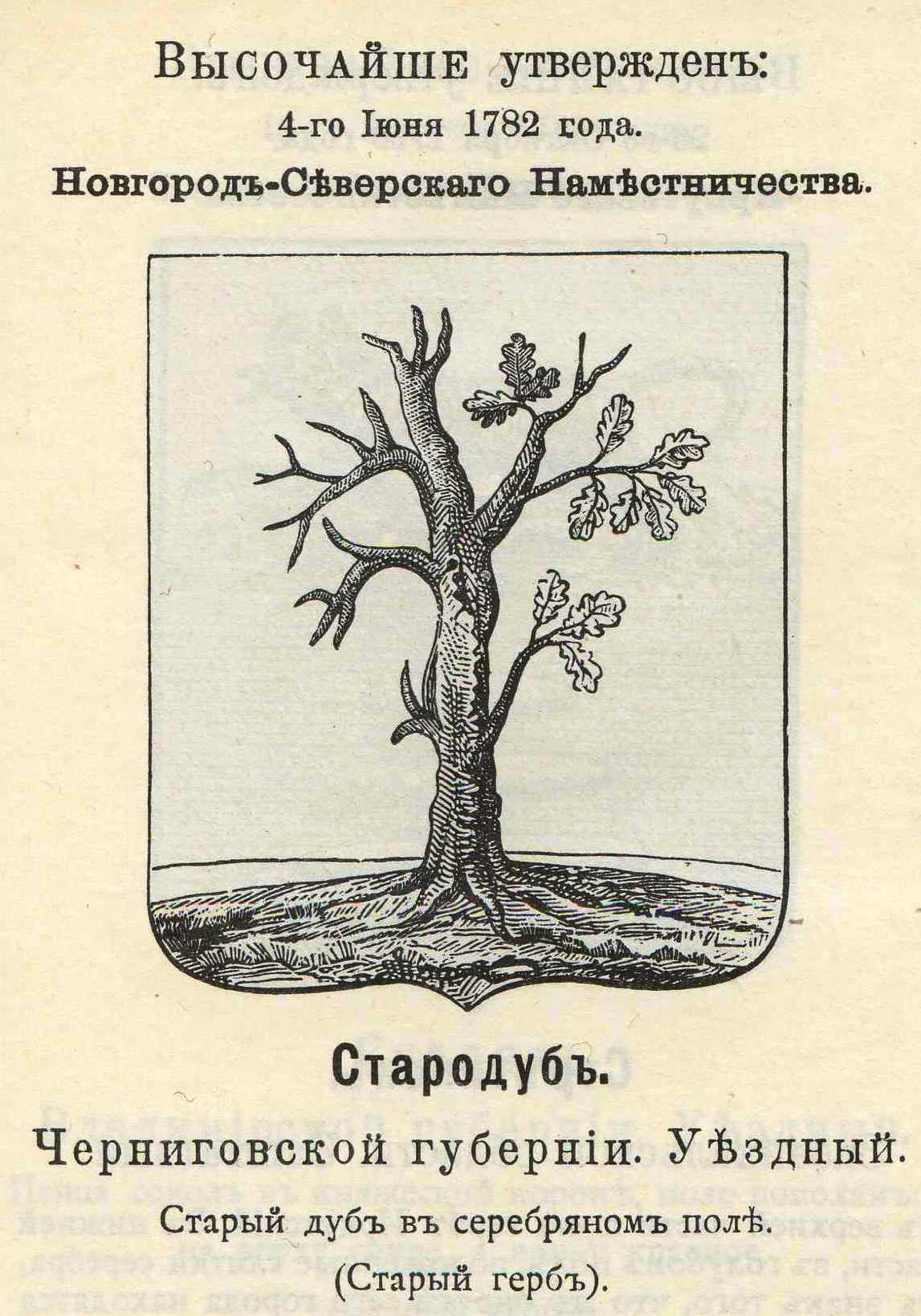 Official Russian Empire coat of arms Starodub. Т.н. "гласный" герб (старый дуб) Российской Империи уездного города Стародуб Черниговской губернии с официальным описанием в Гербовнике Винклера.